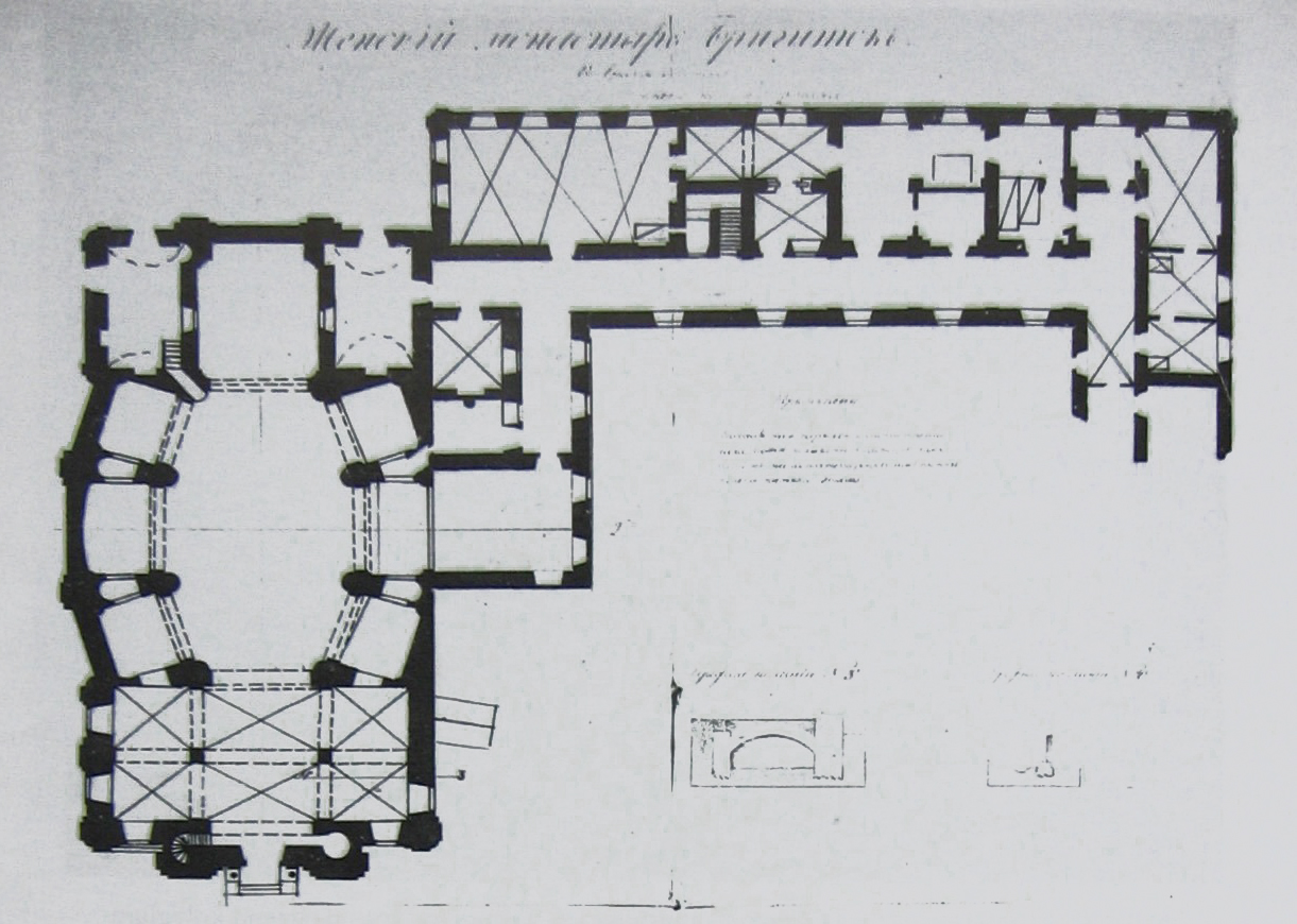 Беларуская (тарашкевіца): Берасьце (Bieraście), прадмесьце Пескі (Pieski). Касьцёл Зьвеставаньня Найсьвяцейшай Панны Марыі і кляштар брыгітак, плян